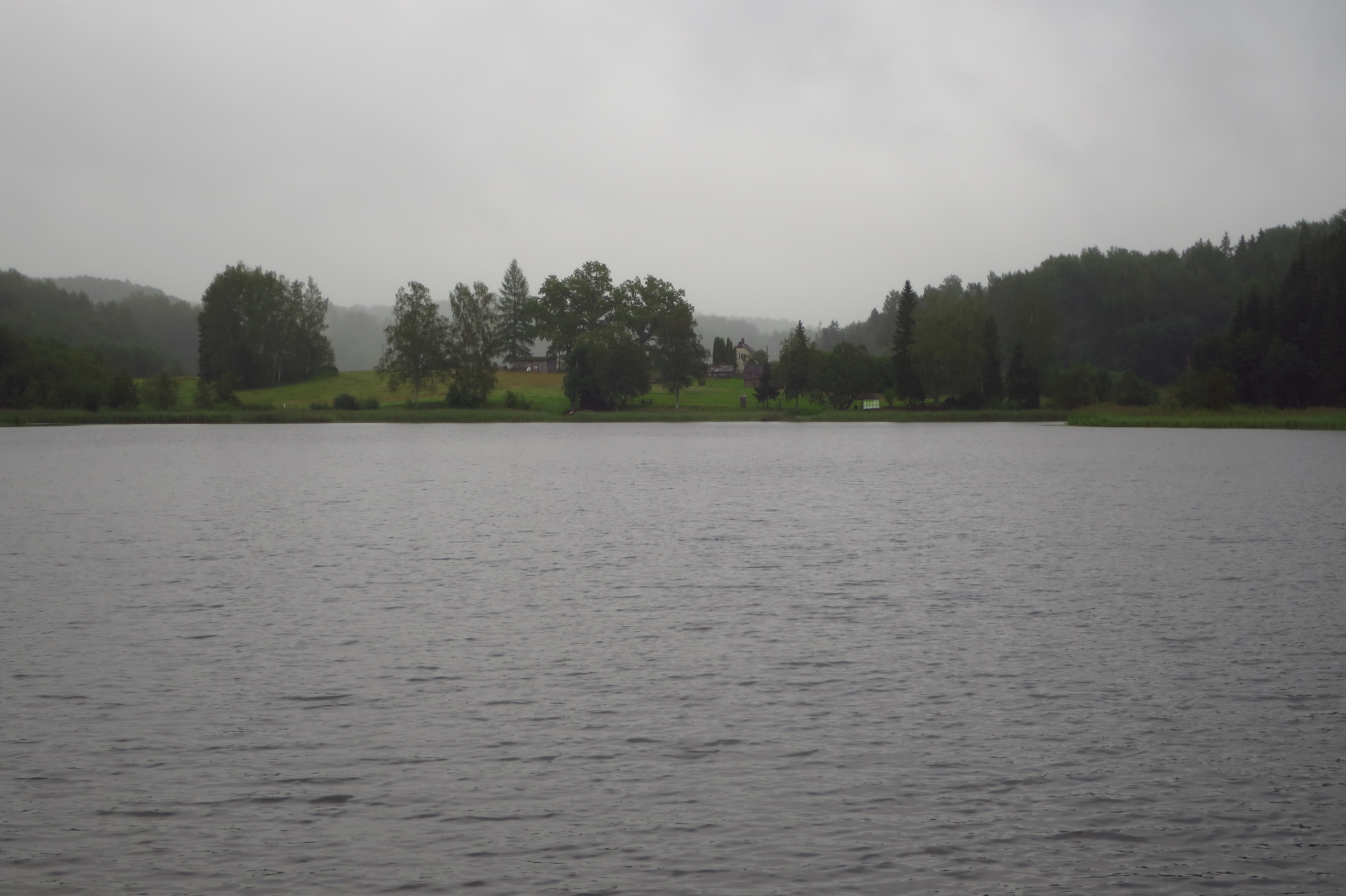 Vaade Kikka järvele Paganamaa MKA-l põhjakaldalt